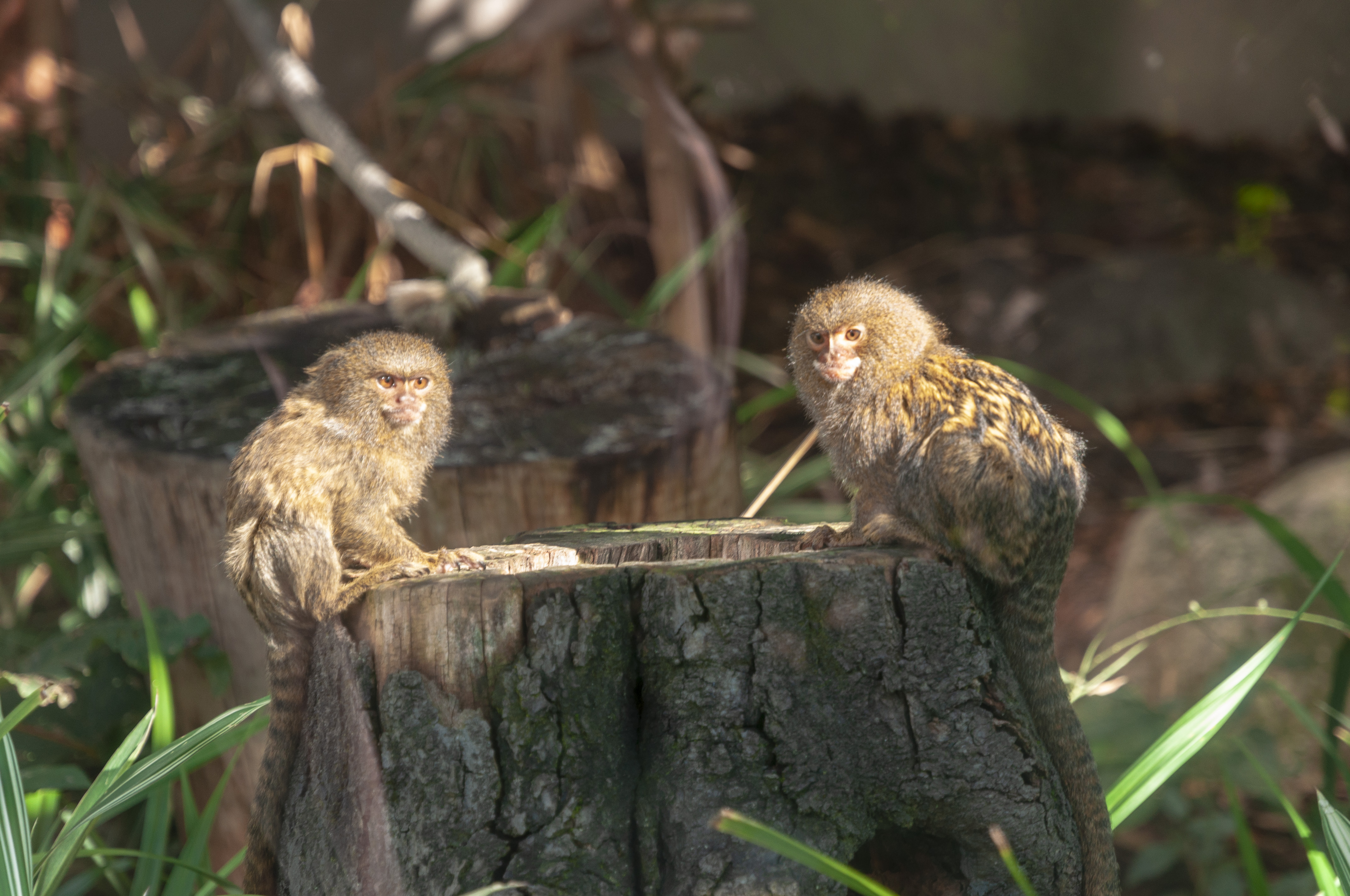 Ouistitis pygmée du Parc zoologique et botanique de Mulhouse.